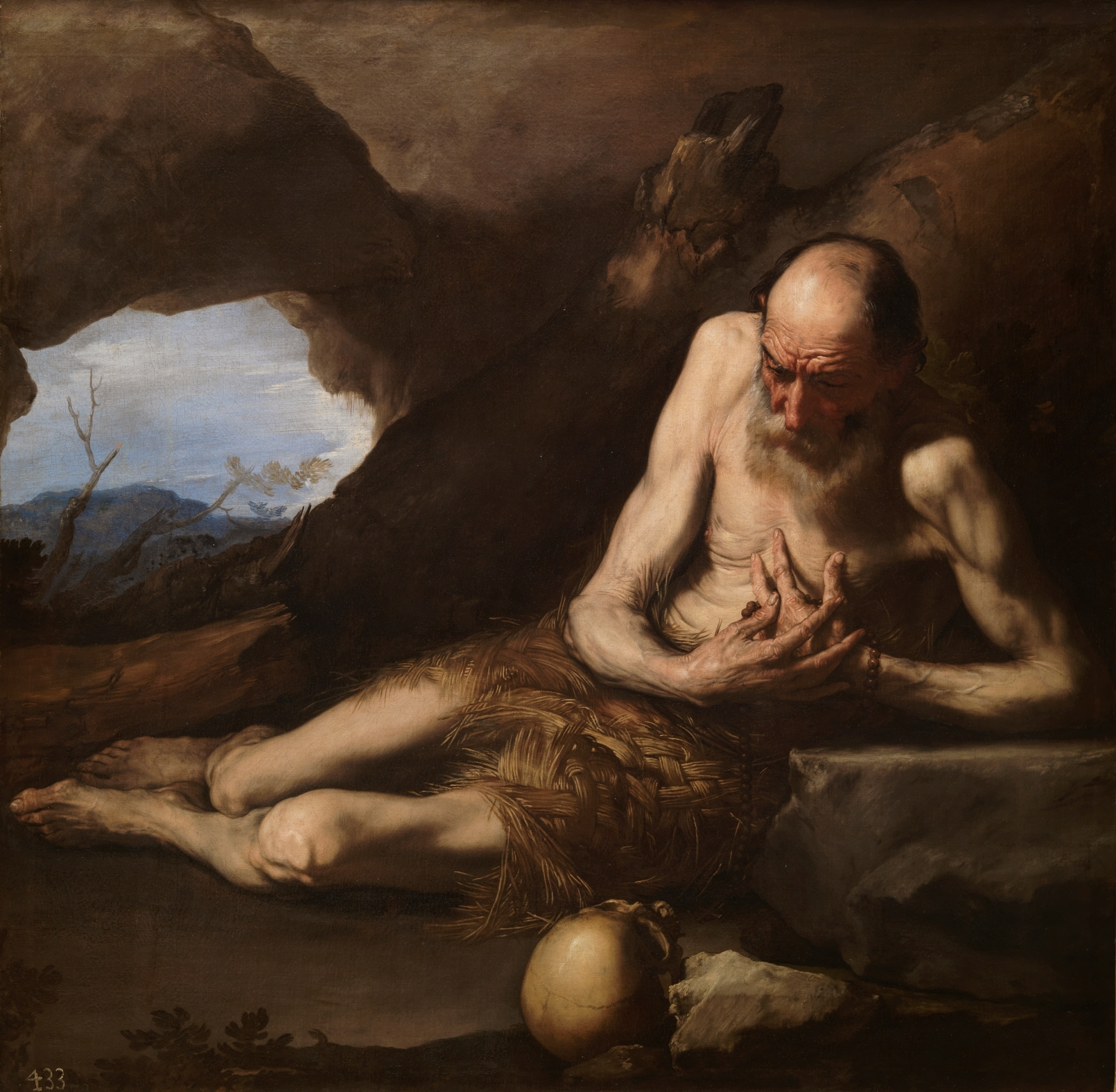 San Pablo, el primer ermitaño, medita ante una calavera en la soledad de su retiro. Es una obra de la última etapa de Ribera, quien desterró las tinieblas que caracterizan las primeras décadas de su carrera y apostó por una mayor claridad y una gama cromática más amplia.